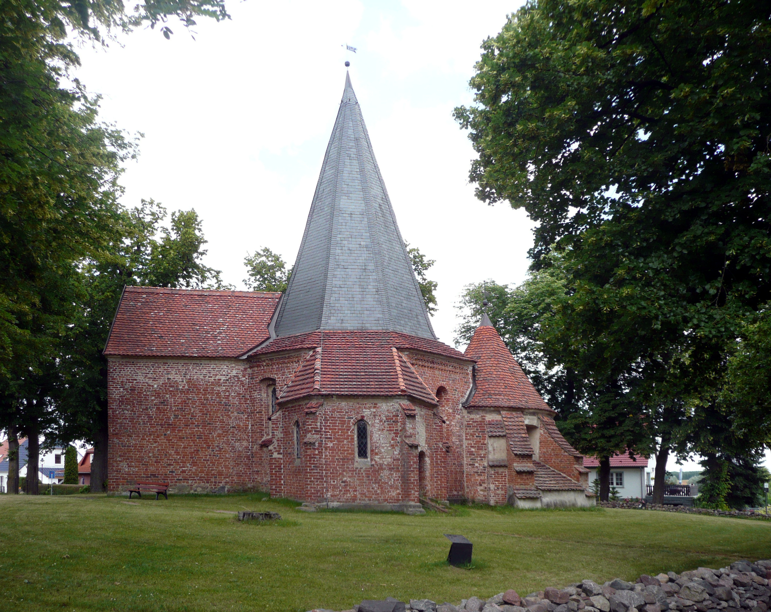 Oktogonale Dorfkirche Ludorf, Landkreis Müritz